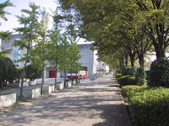 Toyo University Asaka Campus (東洋大学朝霞キャンパス)